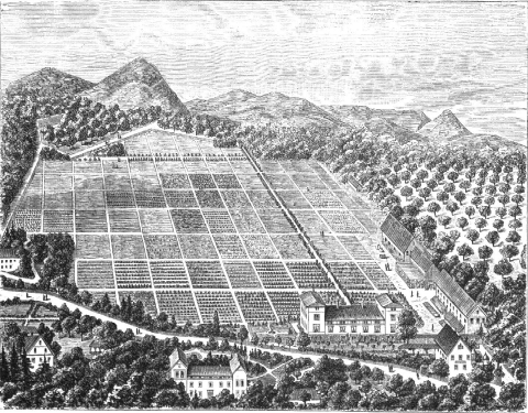 Anischt des Pomologischen Instituts in Reutlingen, veröffentlicht in den Pomologischen Monatsheften 1885